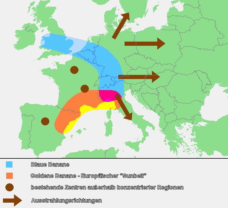 Blaue und Goldene Banane, Abwandlung von Bild:Blaue-banane.png